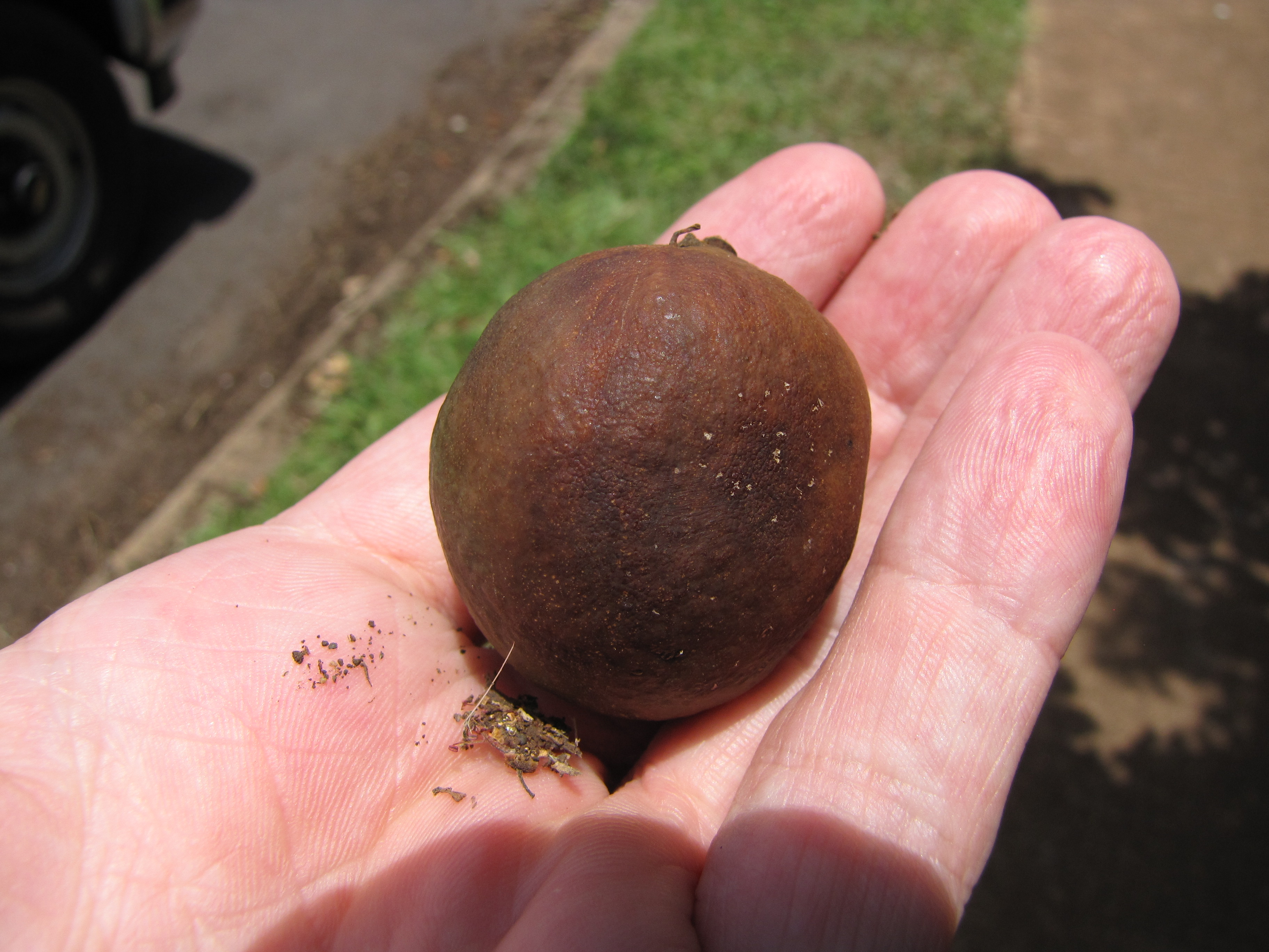 Pometia pinnata (Fijian longan, island lychee, langsir) Fruit in hand at Napili, Maui, Hawaii. July 14, 2009 #090714-2736 Image Use Policy